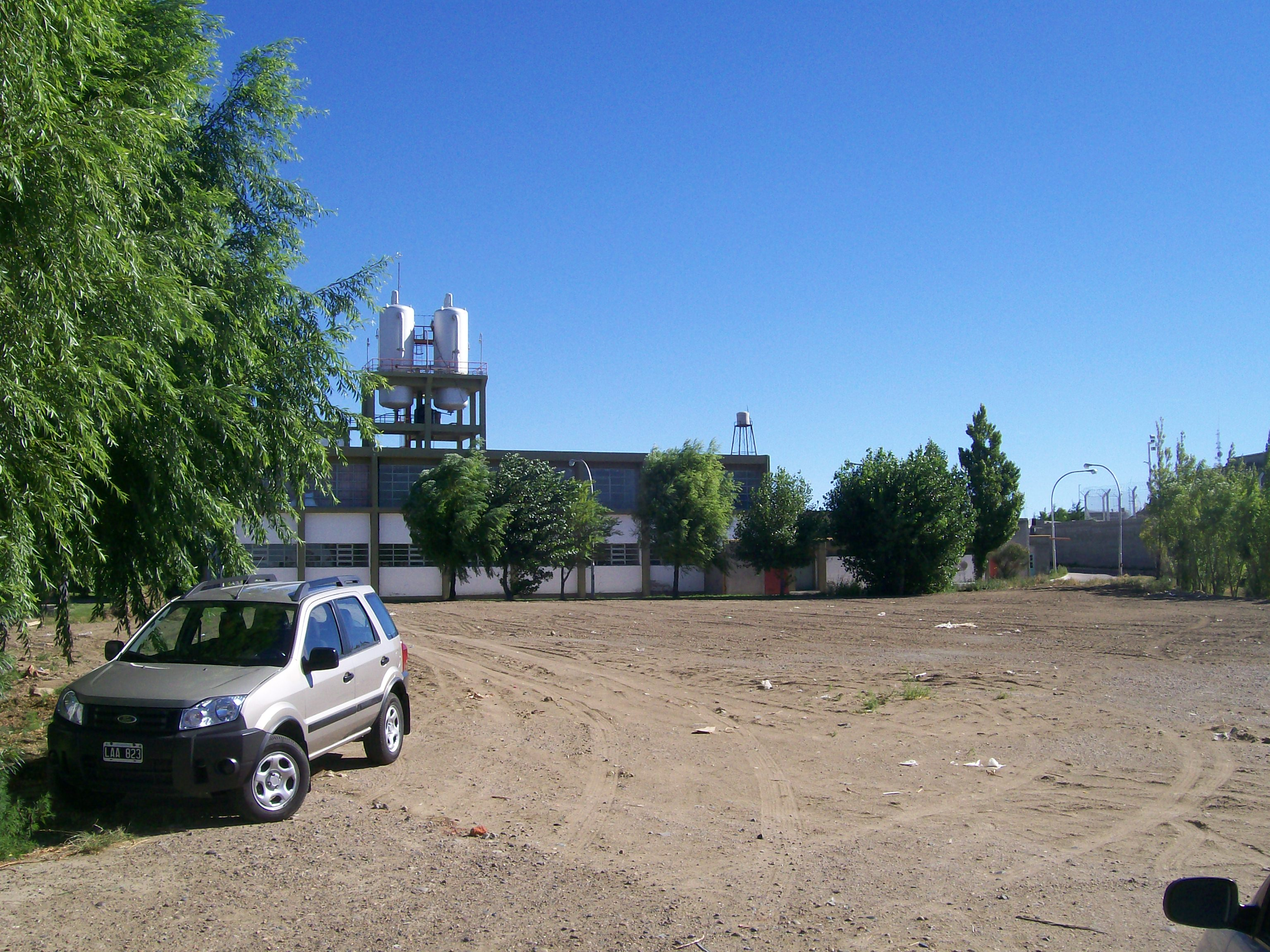 universidad publica